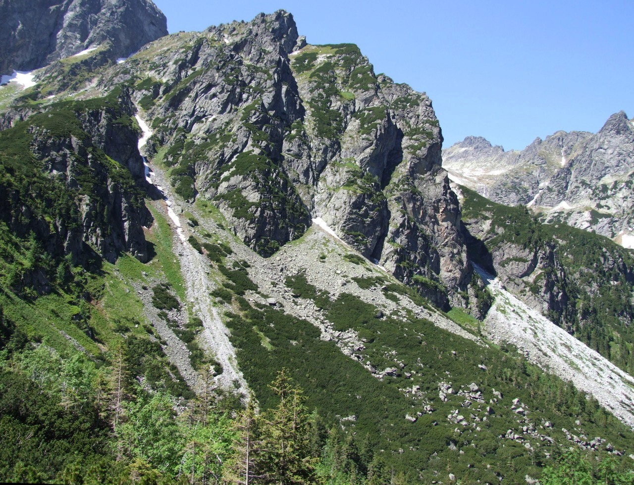 Gankowa Strażnica, Tatry Wysokie